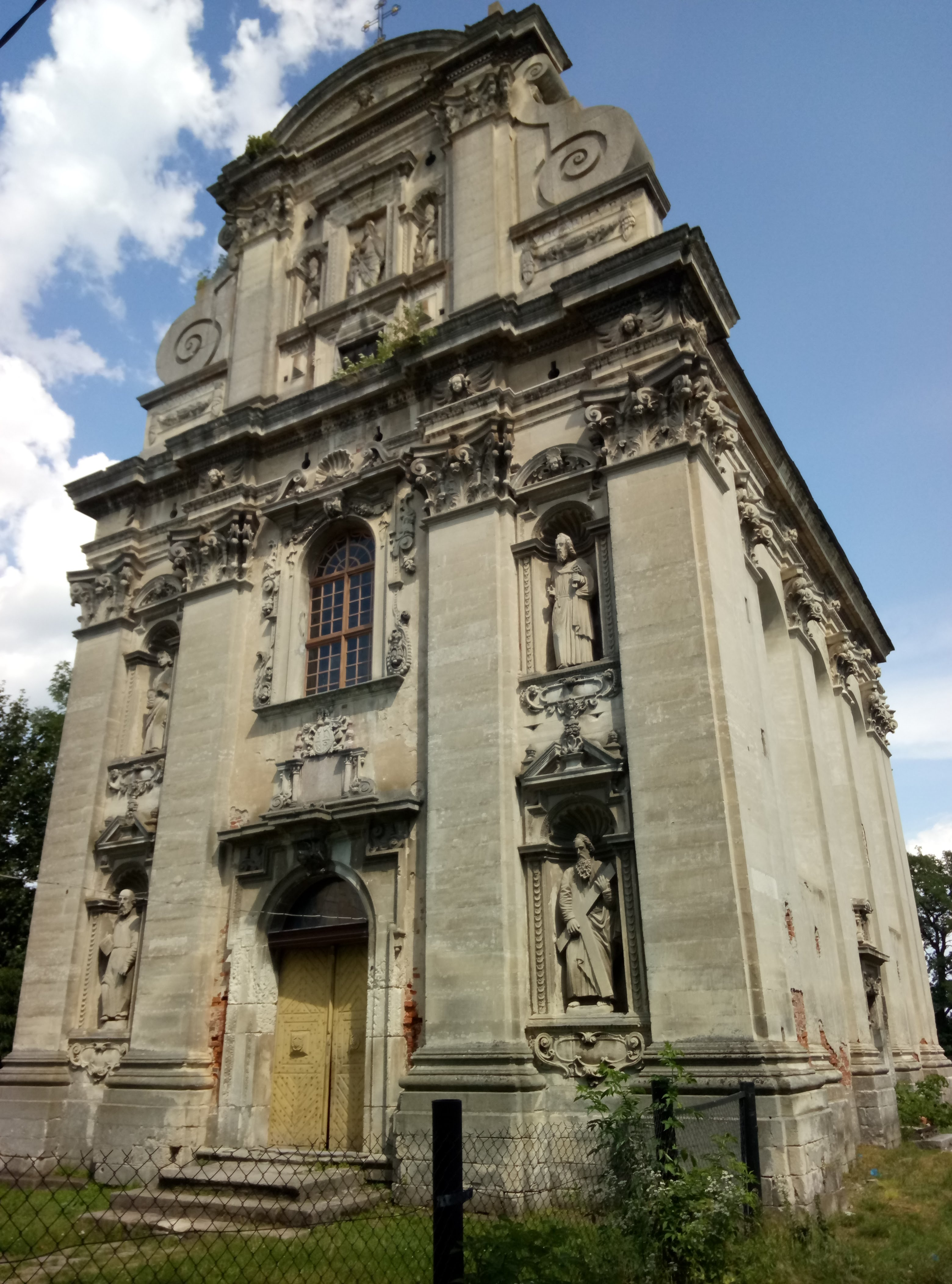 костел в Комарні